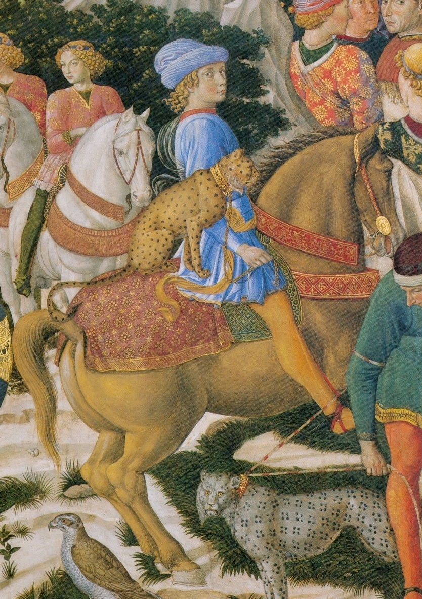 Giuliano de' Medici as a teenager. Fresco by Benozzo Gozzoli, in the "Cappella dei Magi", at Palazzo Medici Riccardi in Florence, Italy.